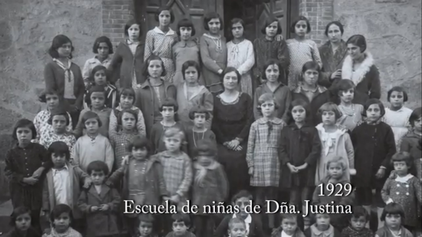 Escuela de niñas de Dña. Justina